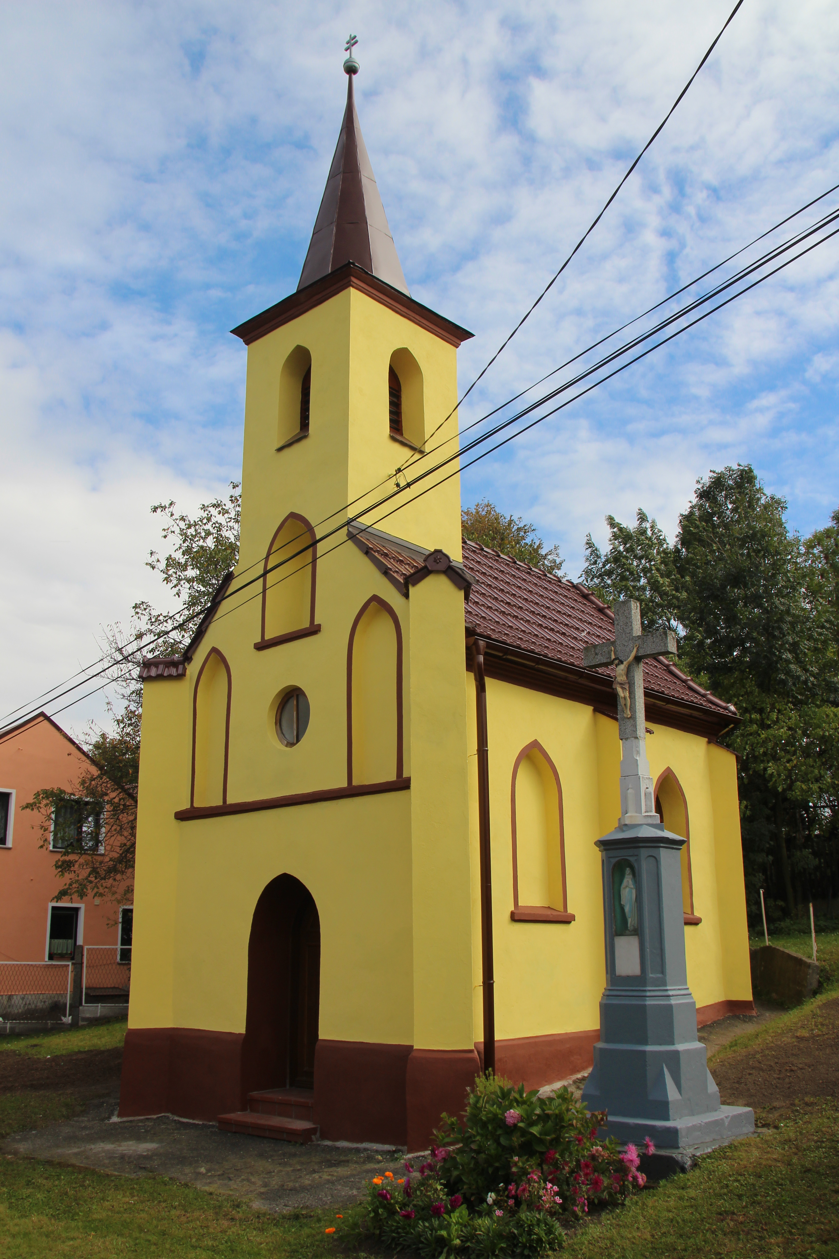 Ligota Mała (w j. niem. Klein Ellguth) – wieś w Polsce położona w województwie opolskim, w powiecie kędzierzyńsko-kozielskim, w gminie Polska Cerekiew.